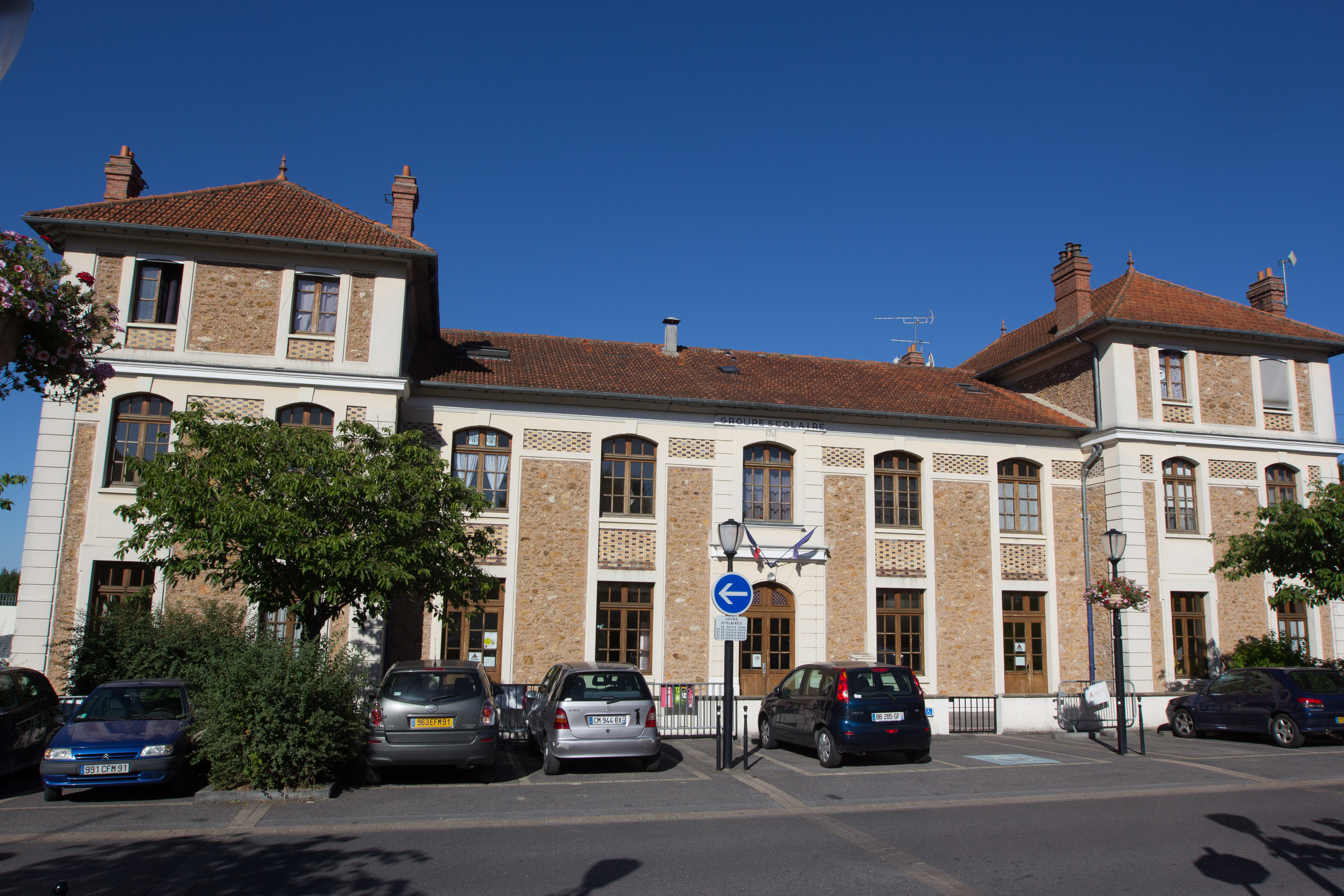 Bâtiment de l'ancienne école primaire Jean-Jaurès de Villabé (Esssonne, France)